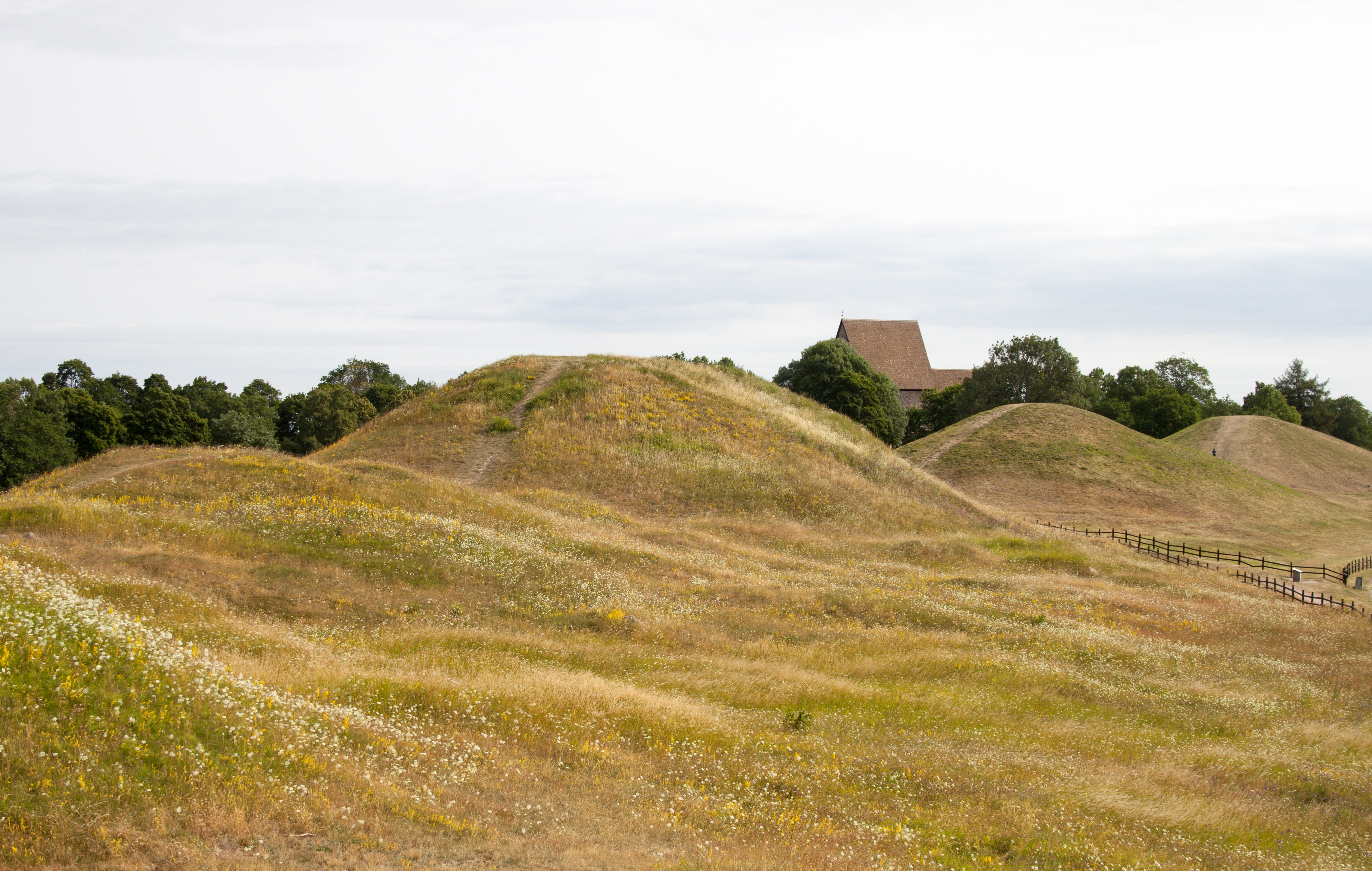 Royal mounds in Gamla Uppsala